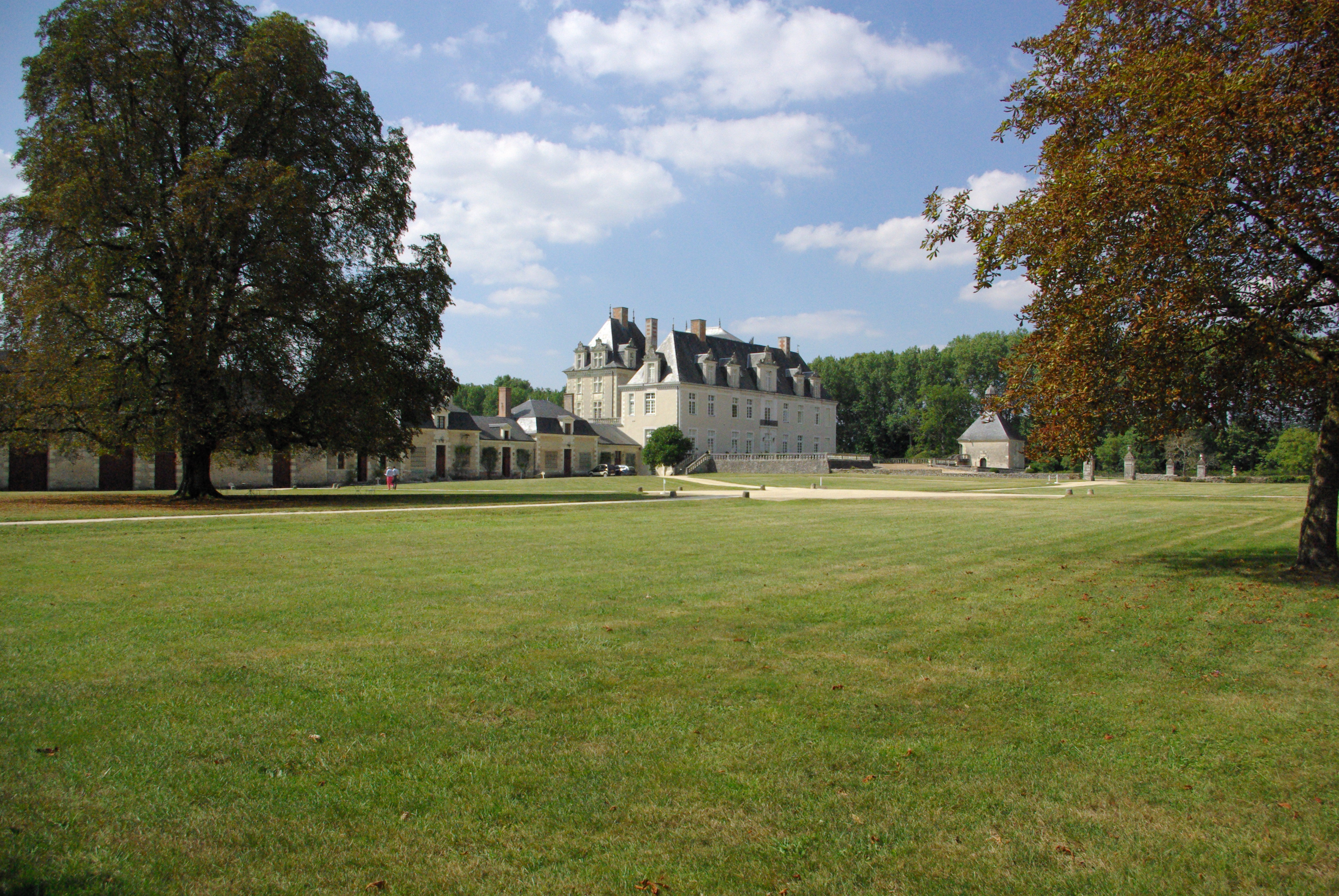 Château de Champchevrier.